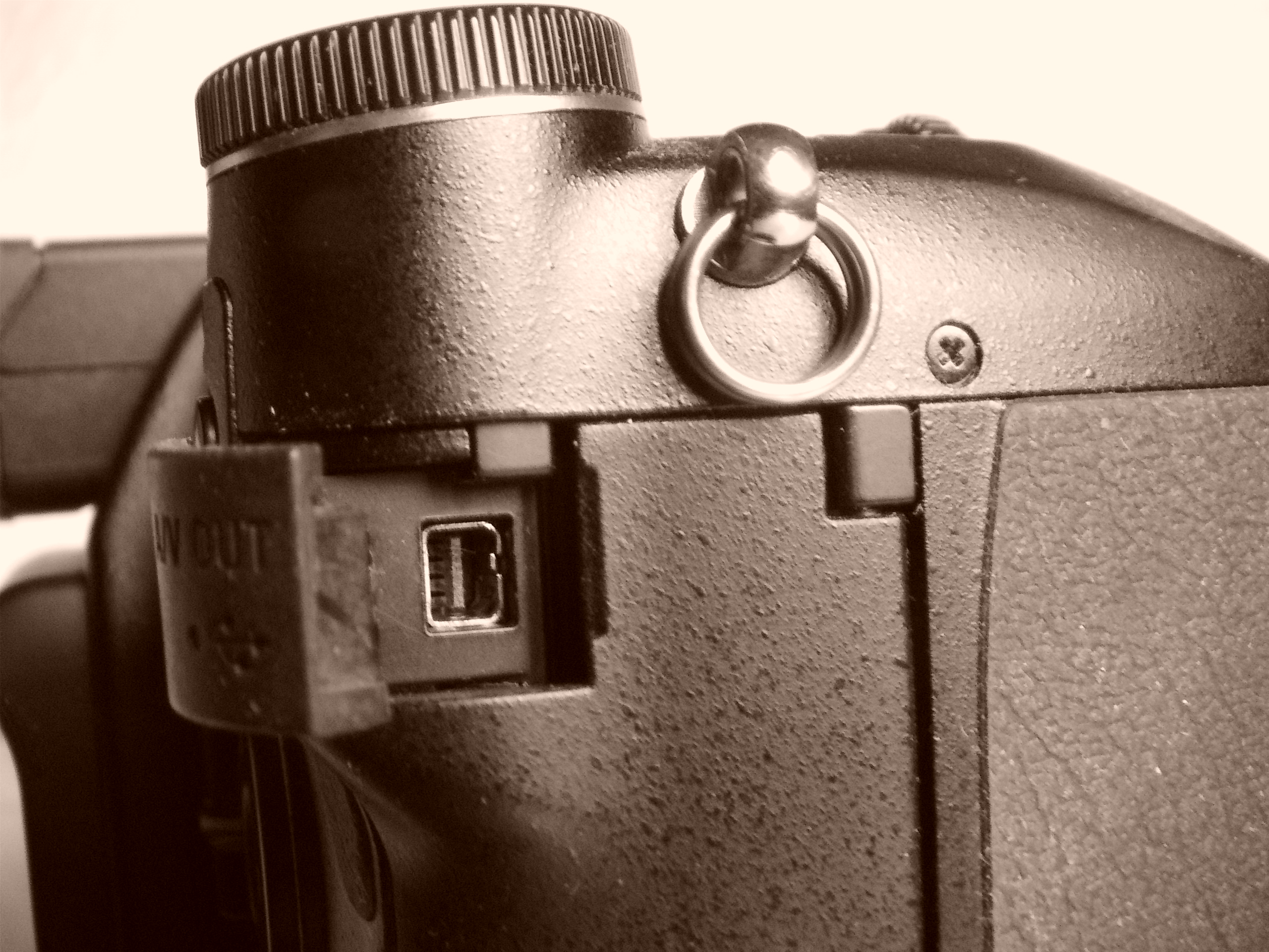 Velocicaptor Audio-video connection on the Konica Minolta DiMAGE A2 digital camera